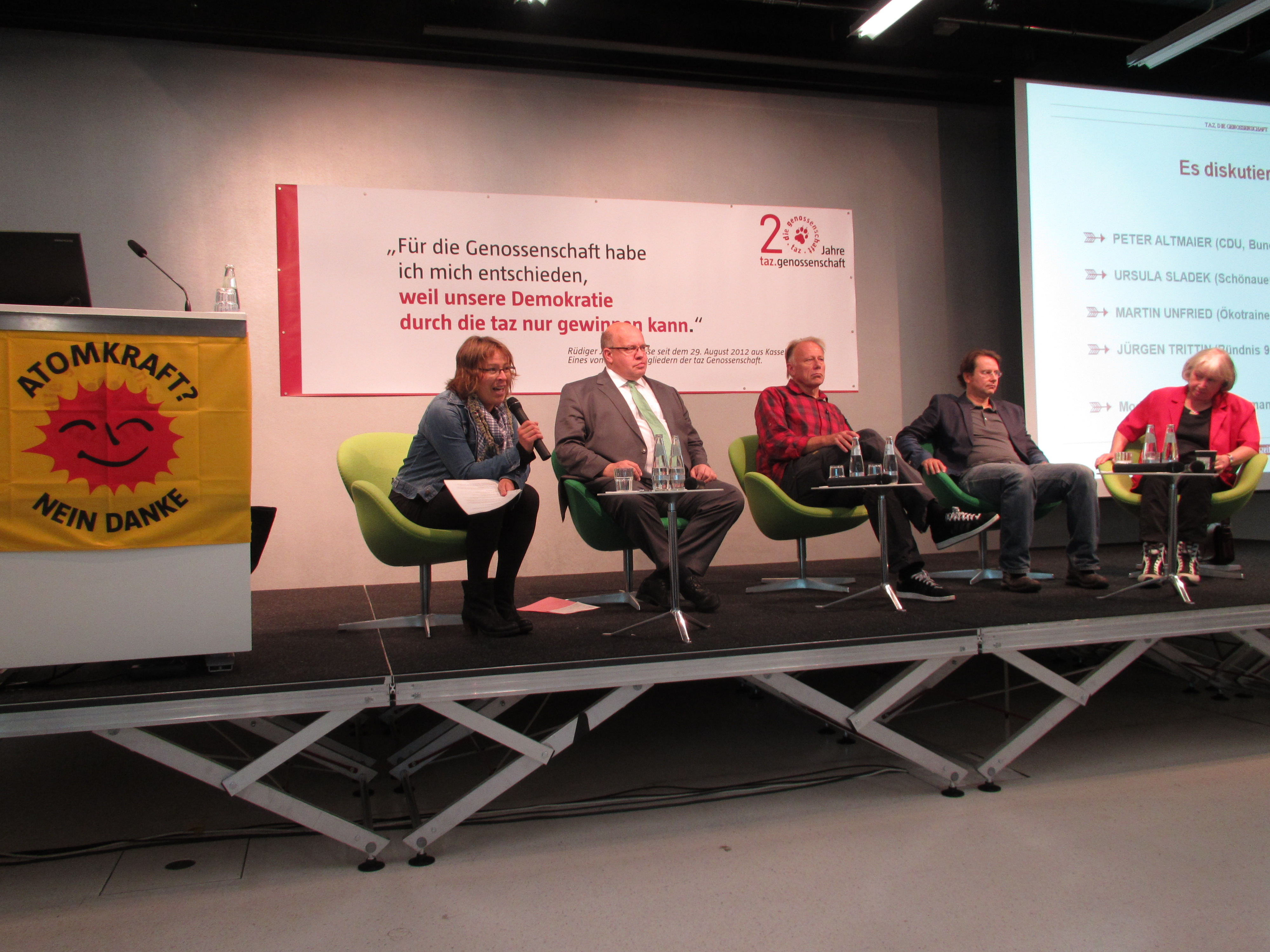 taz-Veranstaltung: "Machen und Nerven: Was die Energiewende von uns verlangt" Samstag, den 15.09.2012, 10:30 Uhr bis 12:00 Uhr Schumannstraße 8, 10117 Berlin (v.l.n.r.): Moderation: Hanna Gersmann, Leiterin des taz-Inlandsressorts Es diskutieren: Peter Altmaier (Bundesumweltminister, CDU) Jürgen Trittin (Bündnis90/Die Grünen) Martin Unfried (Ökotrainer und taz Genosse) Ursula Sladek (Geschäftsführerin Elektrizitätswerke Schönau) Quelle -Version der Quelle